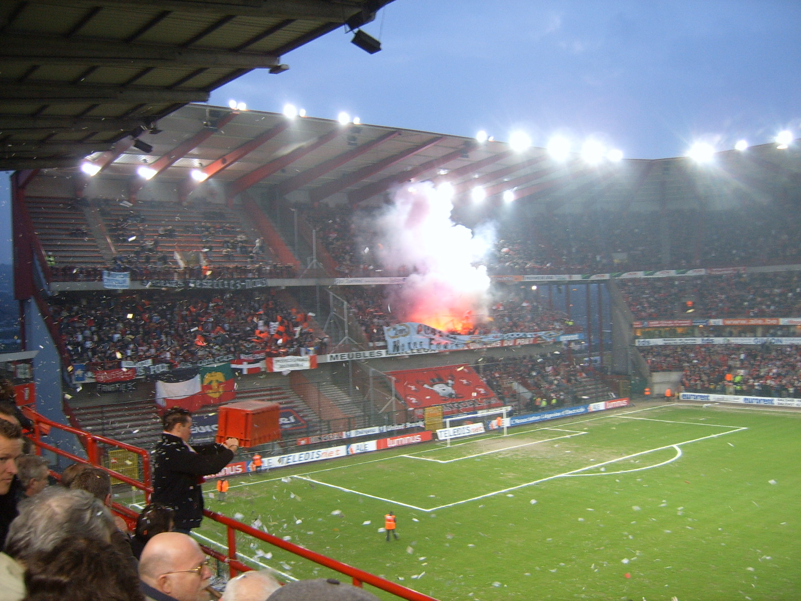 Stade du Standard de Liège à Sclessin. Contre le Bruxelles, avril 2006.